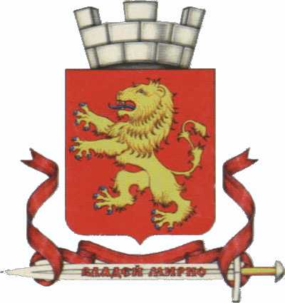 Полный герб Ржева, Тверская область